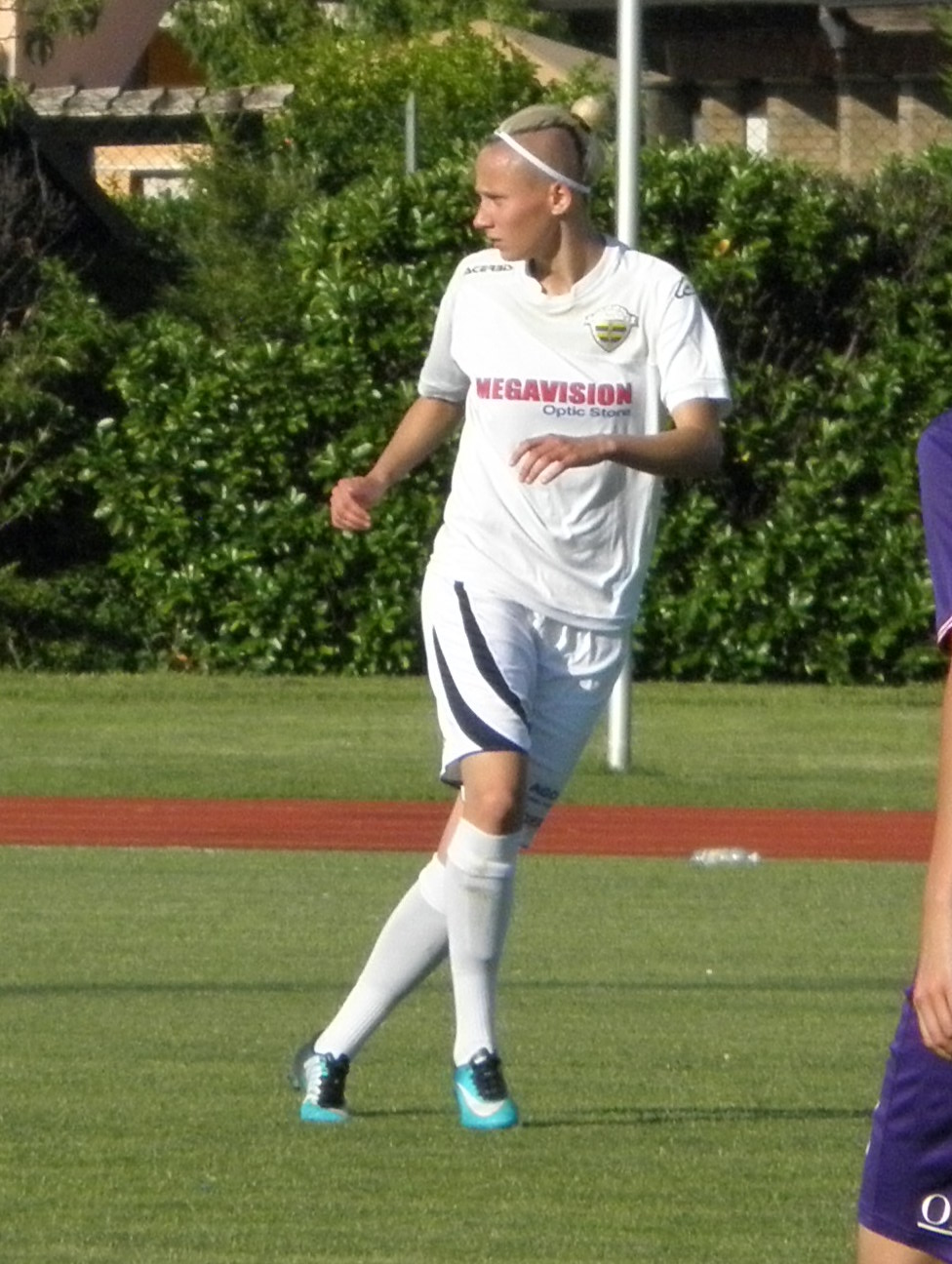 Abano Terme, Stadio delle Terme: 16 giugno 2018, spareggio UEFA Women's Champions League.